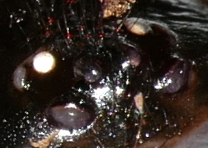 Zoom sur les yeux de Cteniza sauvagesi, Corse, France.